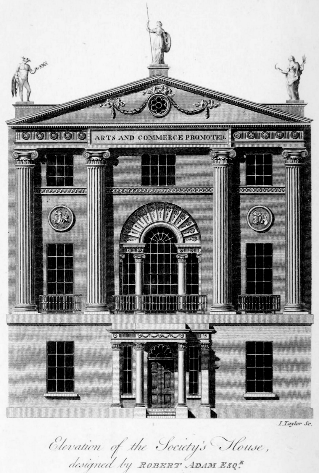 Royal Society of Arts (1761)